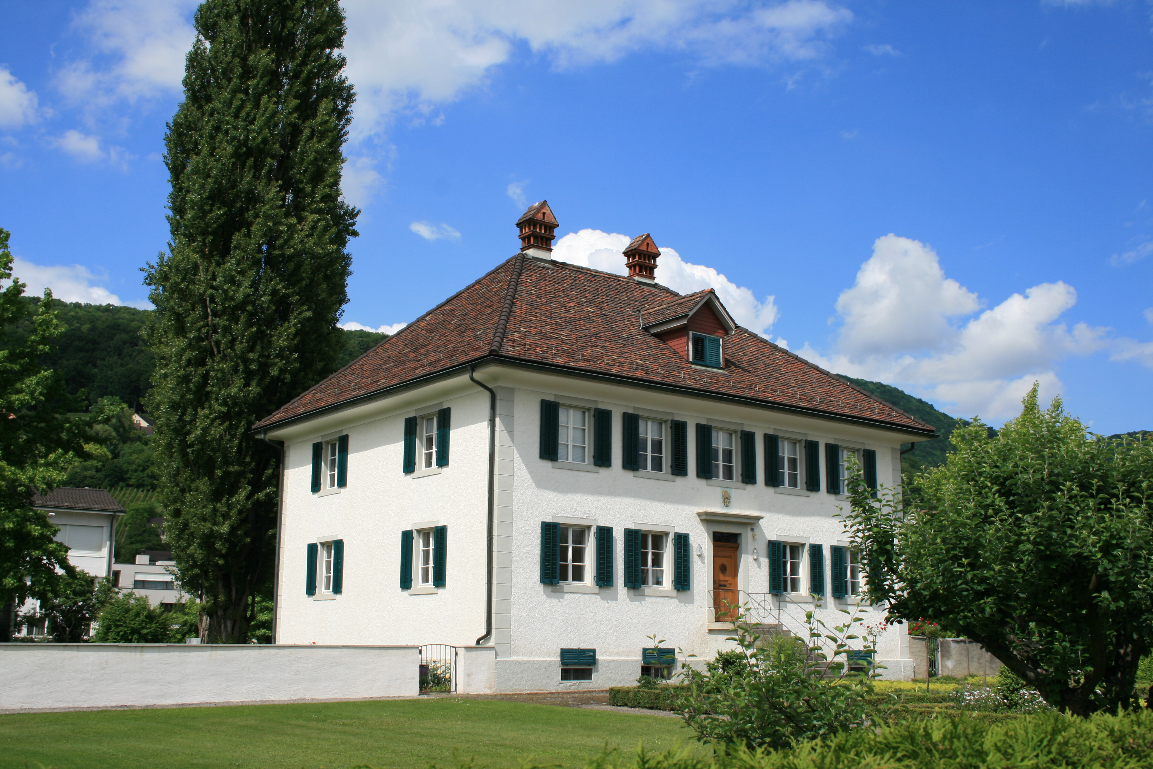 Röm.-kath. Pfarrhaus St. Sebastian, Wettingen, Schweiz